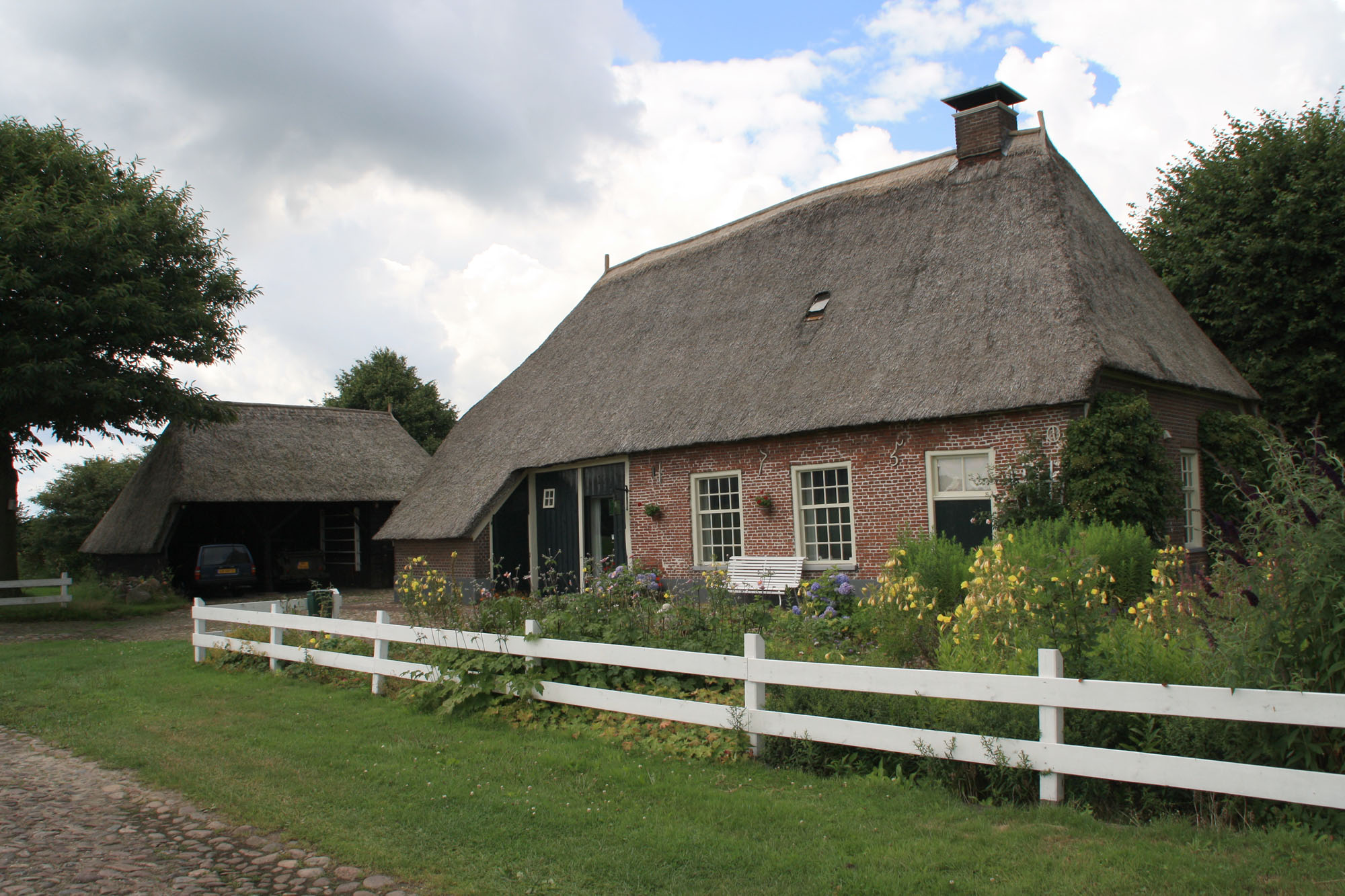 Boerderij (1750), Schoolstraat 20, Valthe (gemeente Borger Odoorn). Rijksmonument nr: 38623 Boerderij onder met riet gedekt wolfdak. In de voorgevel jaartalankers: 1750. Vensters met 20-ruitsschuiframen, deur met eenvoudig bovenlicht.